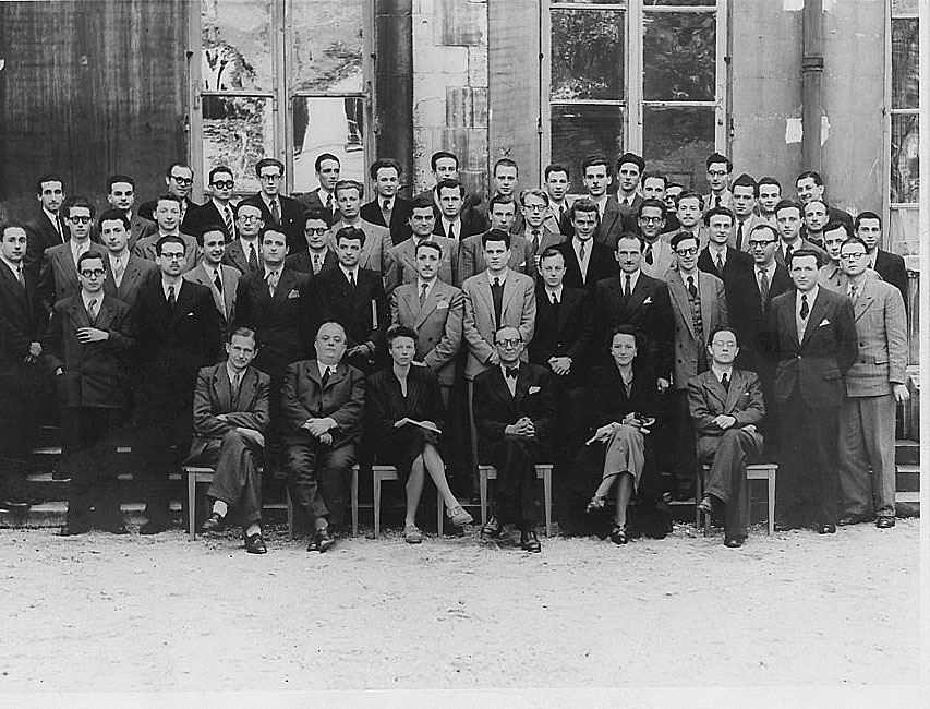 Promotion Nations Unies de l'Ecole Nationale d'Administration (1949)